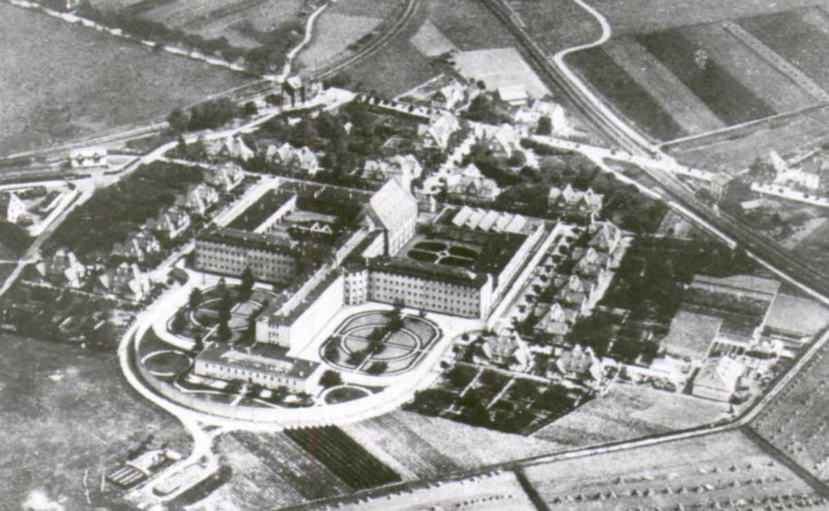 Zuchthaus Diez/Lahn 1912